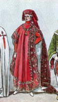 Knight of the Golden Fleece // Рыцарь ордена Золотого руна, основанного в 1429 г. в Брюгге бургундским герцогом Филиппом Добрым в память о походе древнегреческих аргонавтов, которы привезли из Колхиды золотое руно. Алый талар с белой подкладкой и винно-красный широкий плащ с богатой вышивкой; золотая орденская цепь с висящим на ней «золотым руном». Белые башмаки с красными каблуками.